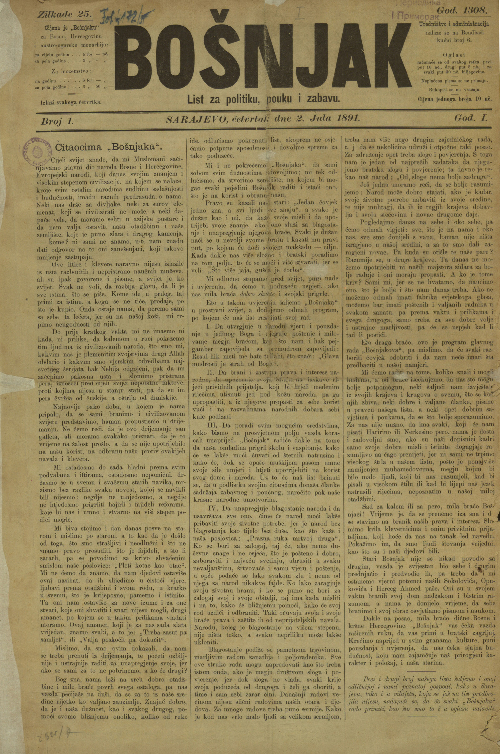 Bosanske novine